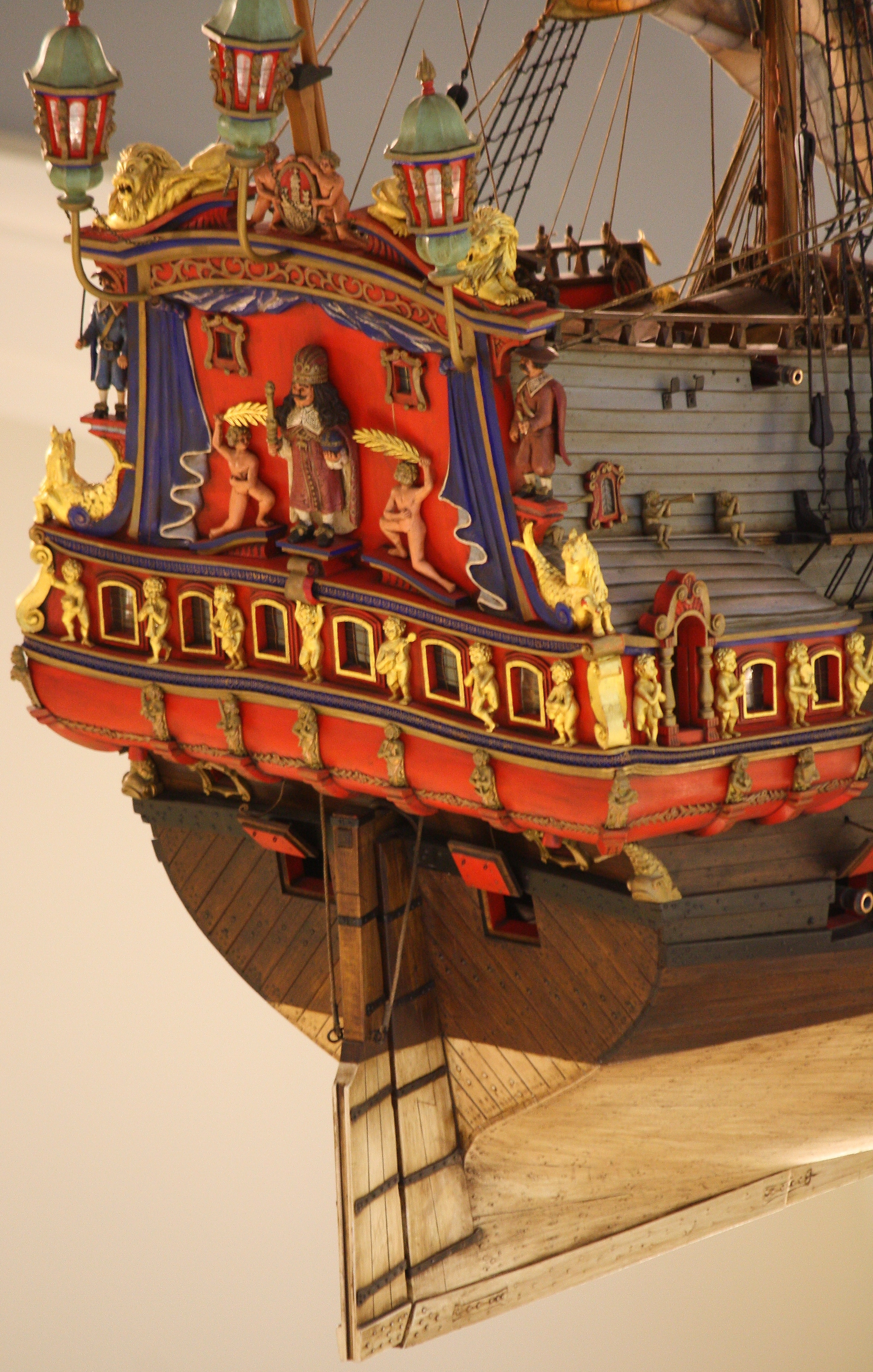 Modell des hamburgischen Konvoischiffes Leopoldus Primus - Detailansicht Heckspiegel